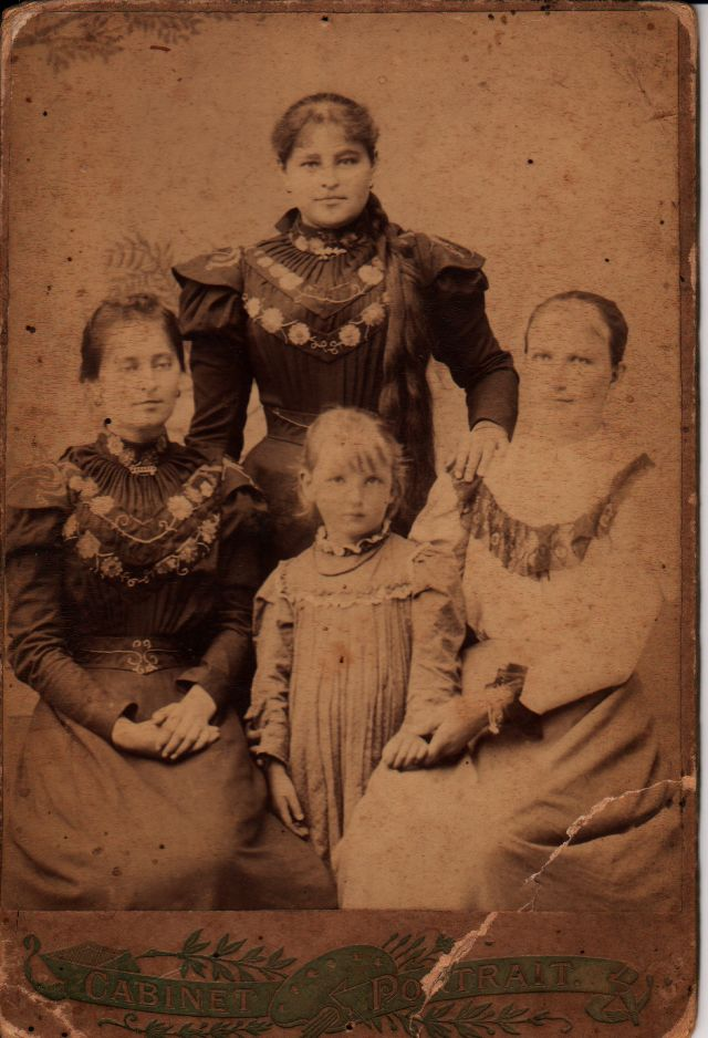 Прасковья Вырва-Левковская (в центре) с сестрой и подружкой Левковской до свадьбы